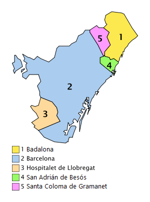 Municipios de la comarca del Barcelonés